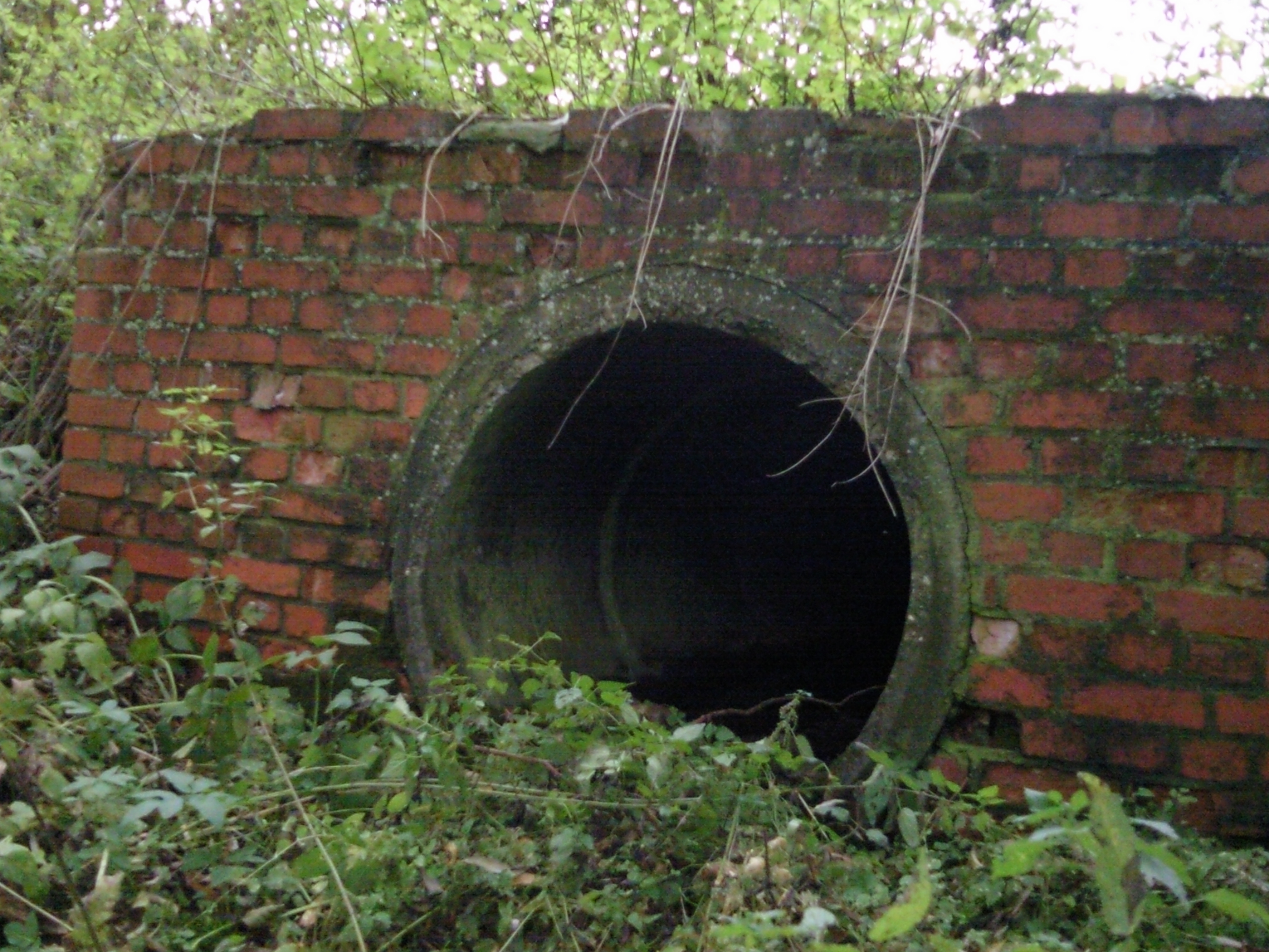 Mundloch des Hüttenstollens. Straßberg (Harzgerode), Sachsen-Anhalt, Deutschland.